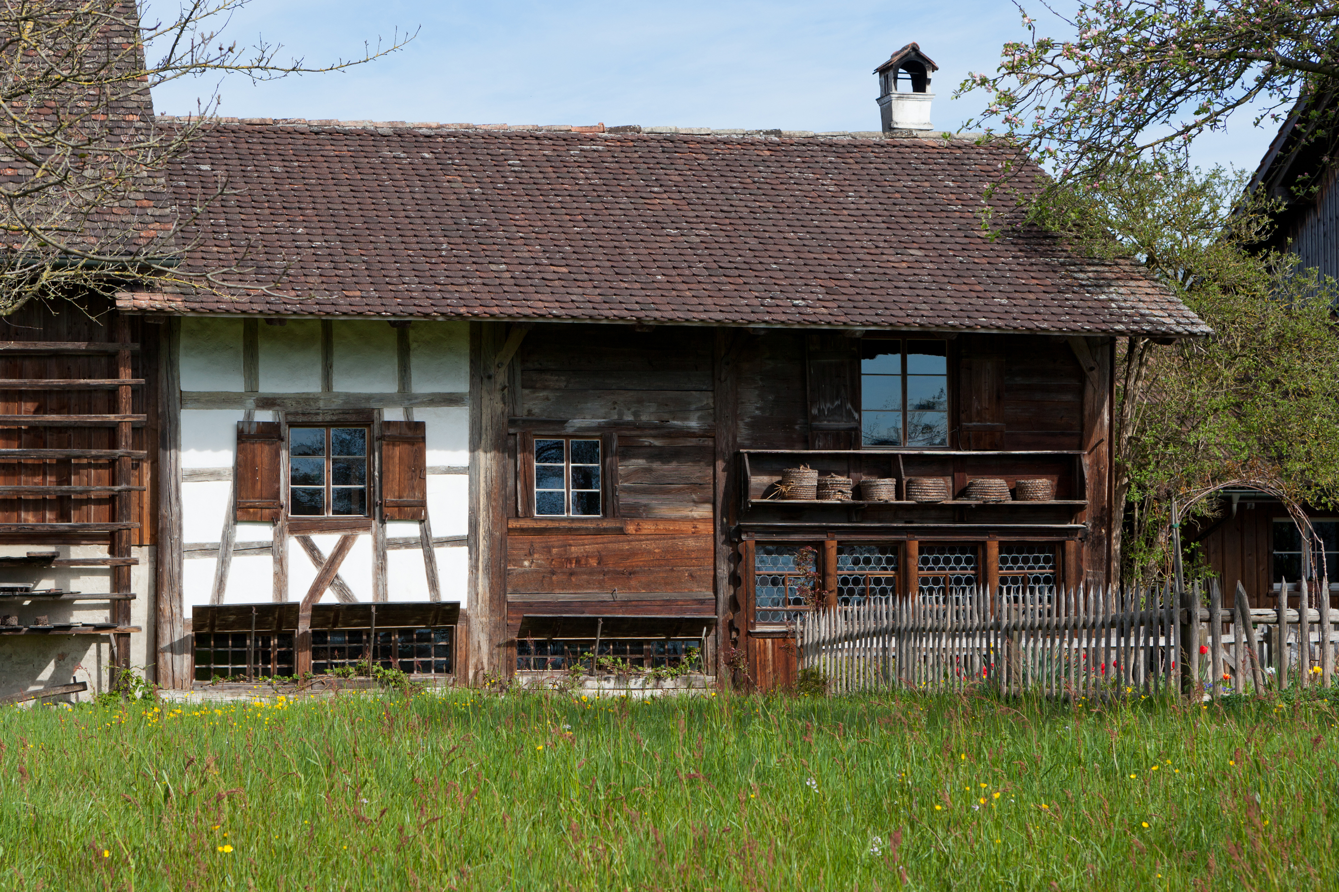 Das Bohlenständerhaus im Ortsteil Schrofen von Amriswil